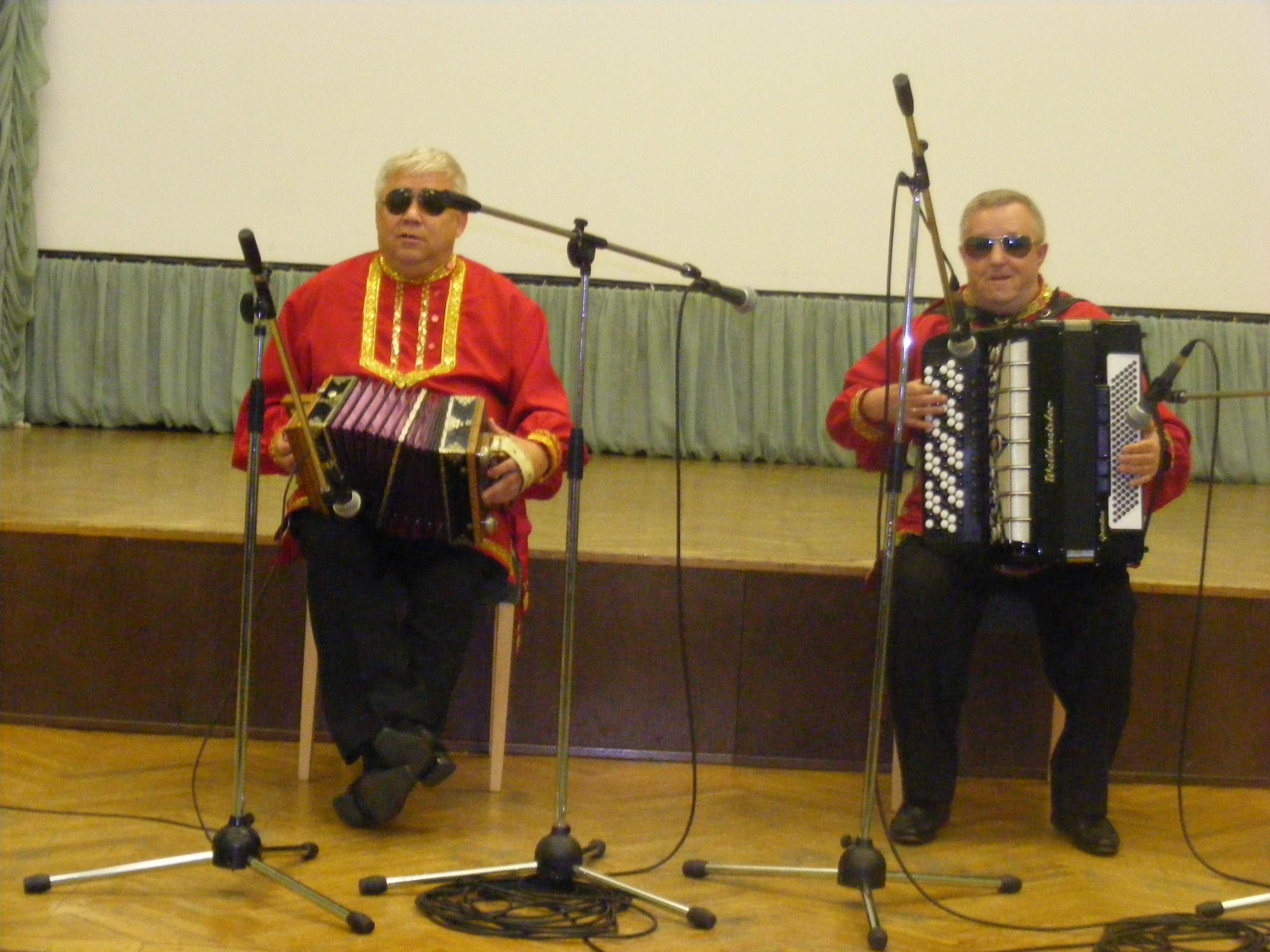 інструментальний дует "Сговор" (Саратов, Росія). 3 місце в номінації "Виконавчі види мистецтва", підномінація "Гра на музичних інструментах"